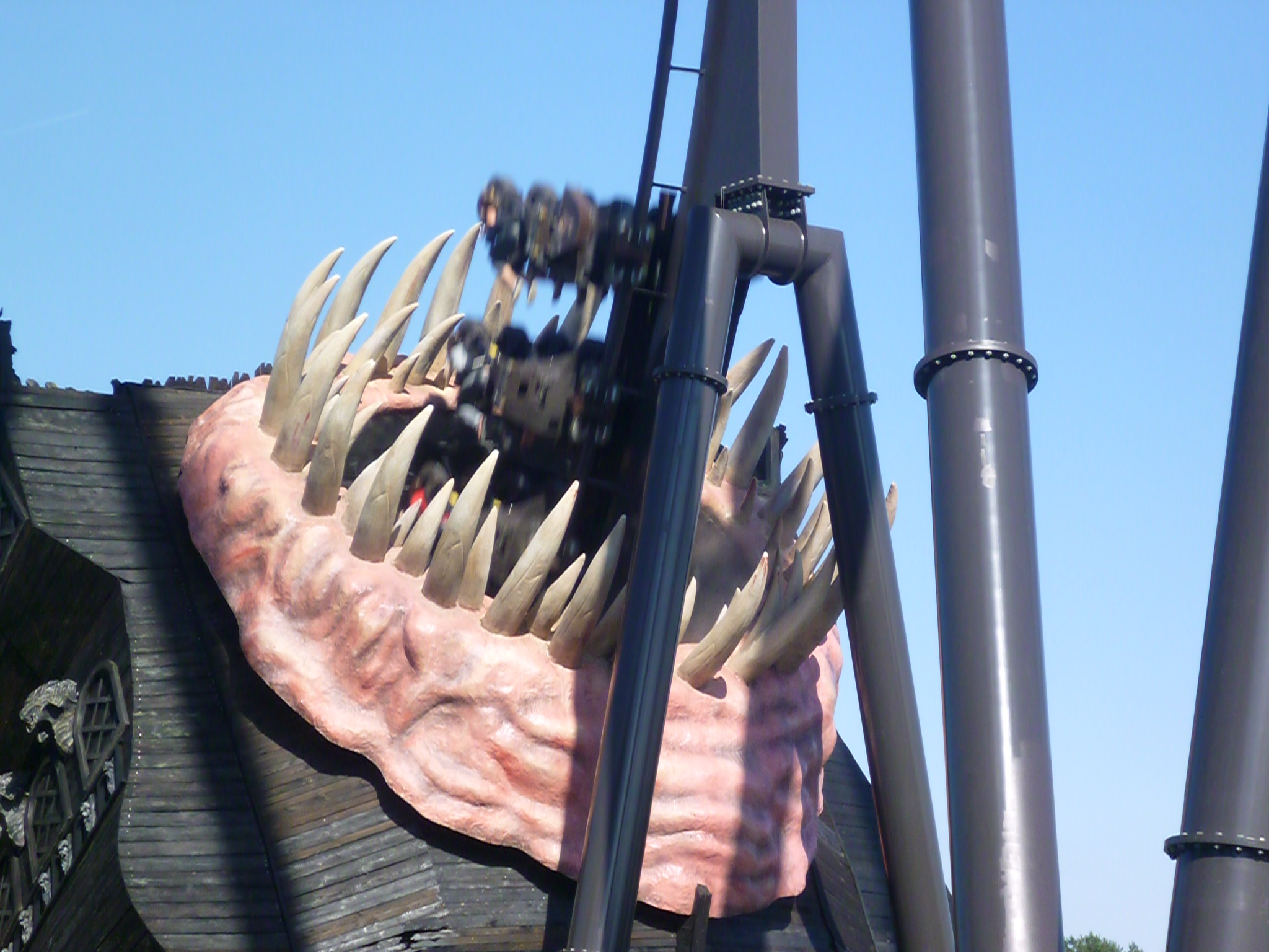 Zug durchfährt das Maul der KRAKE.